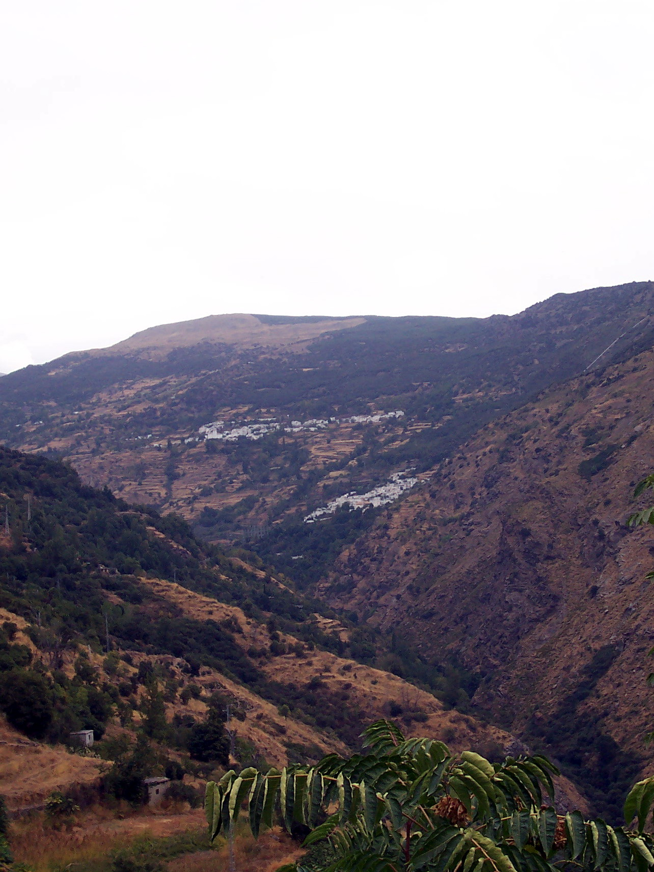 Bubión und Pampaneira von Süden aus gesehen. Etwas weiter links, aber nicht im Bild, liegt noch Capileira.